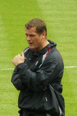 Jim Magilton